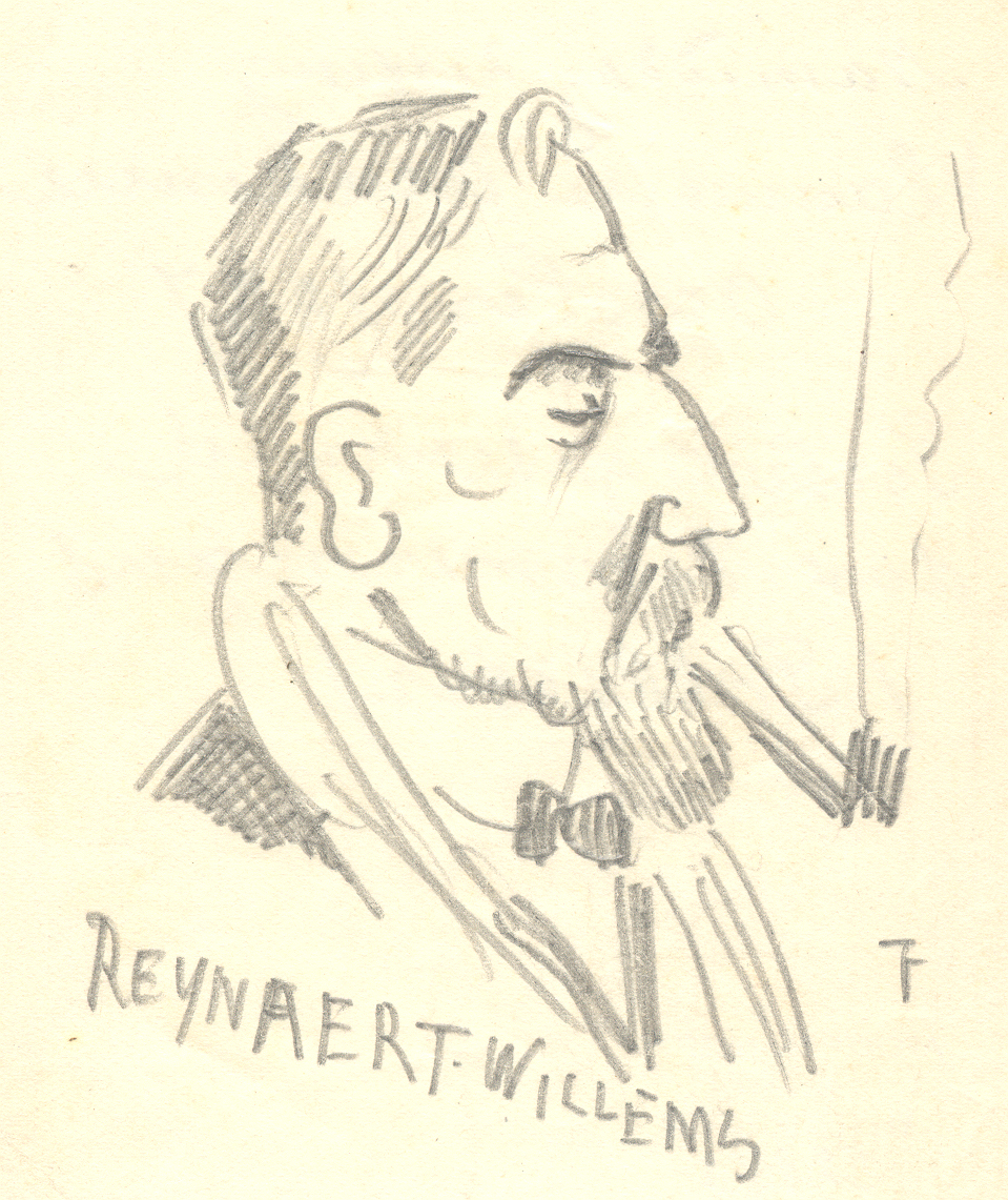 schilderij ( Felix Timmermans ( Letterenhuis